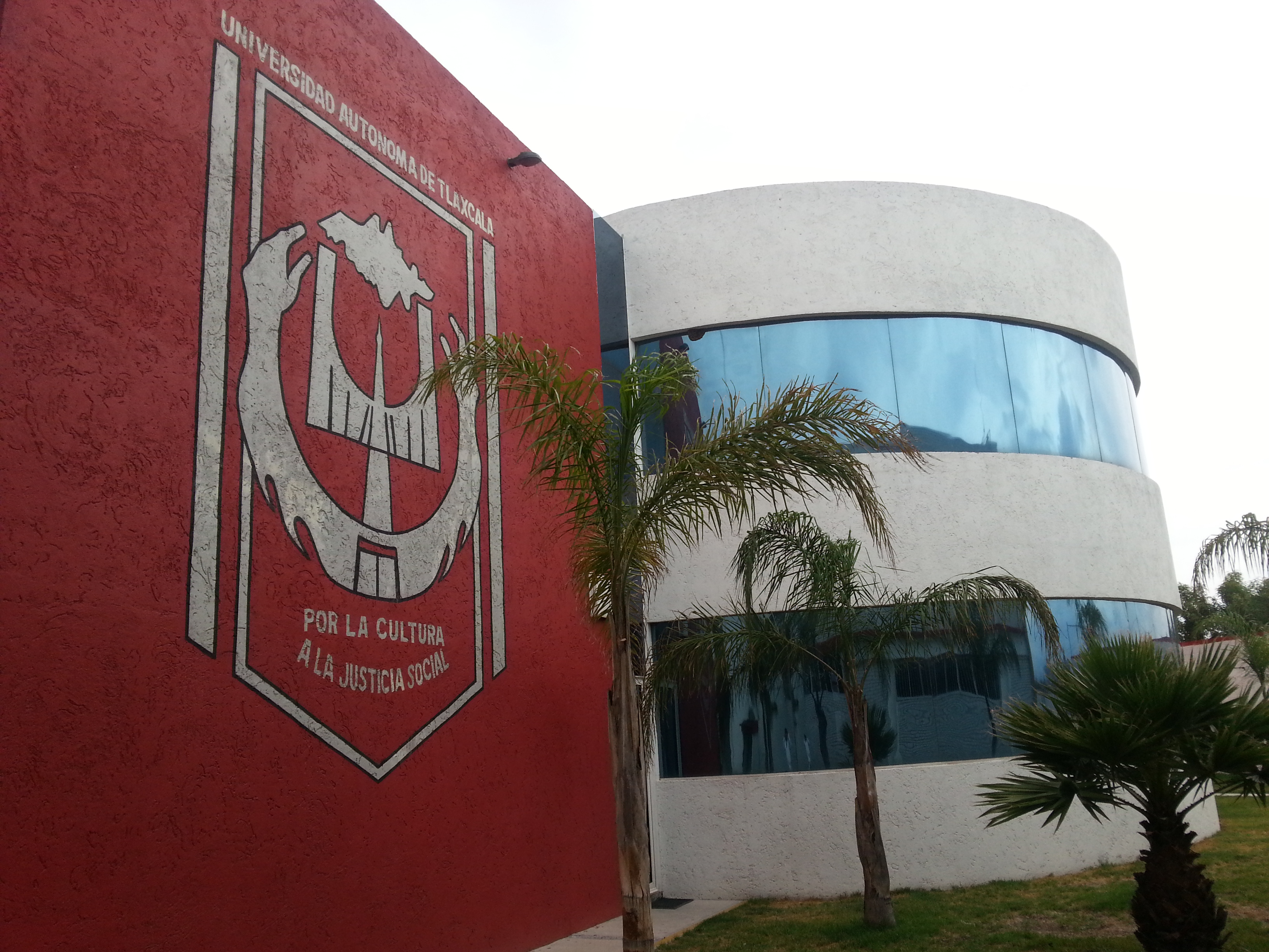 Osteoteca de la Universidad Autónoma de Tlaxcala